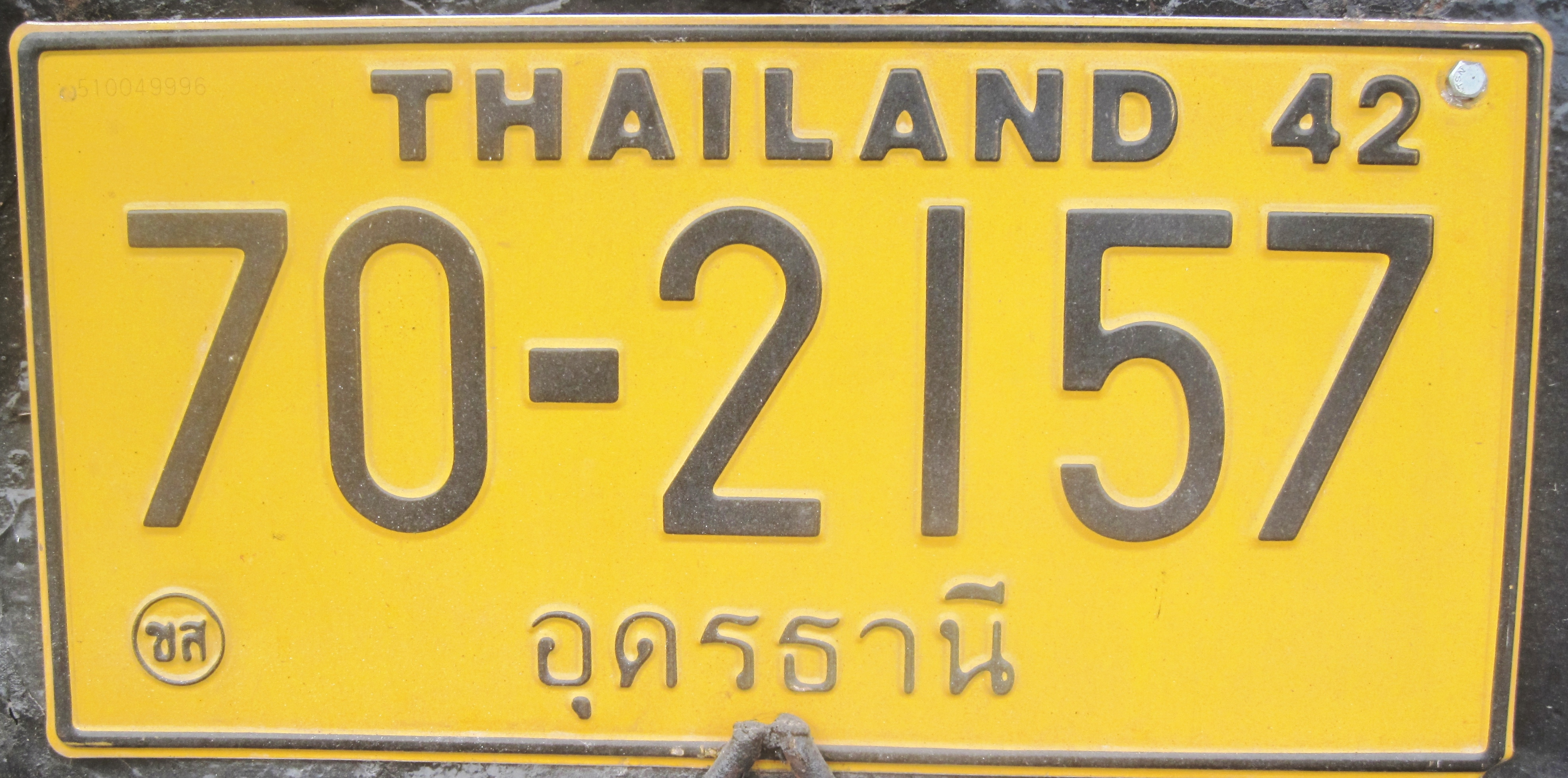 kentekenplaat Thailand